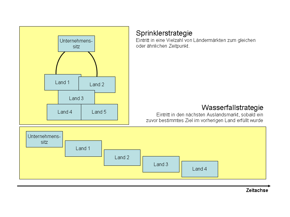 Markteintrittsstrategien in ausländische Märkte